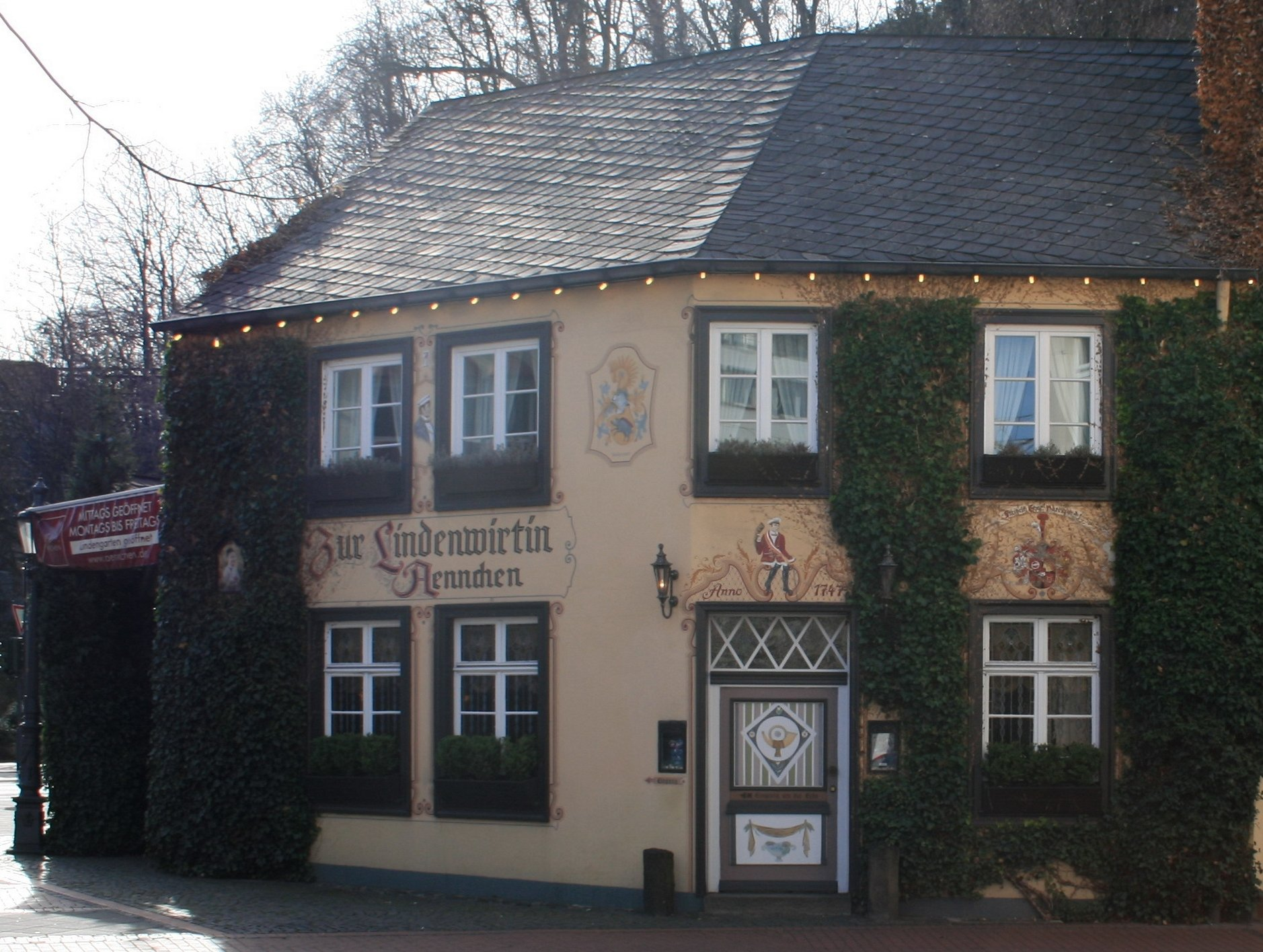 Gasthof „Zur Lindenwirtin Aennchen“ in Bonn-Bad Godesberg, Aennchenplatz 2; mit Elementen des ursprünglichen Fachwerkbaus (von 1647) neu errichtet im Jahre 1974. Quelle: ( Teile des Inventars der Gaststätte gehören der Stadt Bonn und sind an die Erben der Lindenwirtin (Aennchen) verliehen. Quelle: (